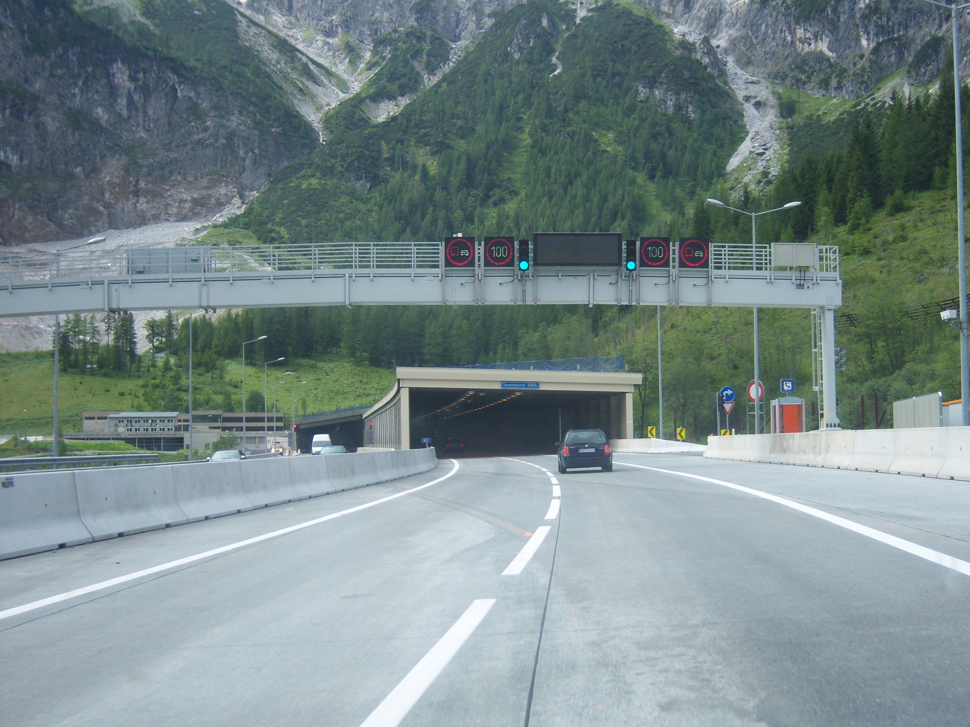 Tauern Autobahn A10 Richtung Villach vor dem Nordportal des Tauerntunnel